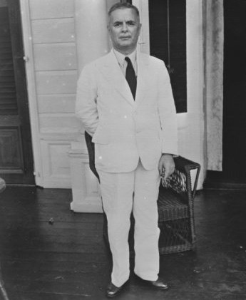 Prof. Mr. J.C. Kielstra, gouverneur van Suriname